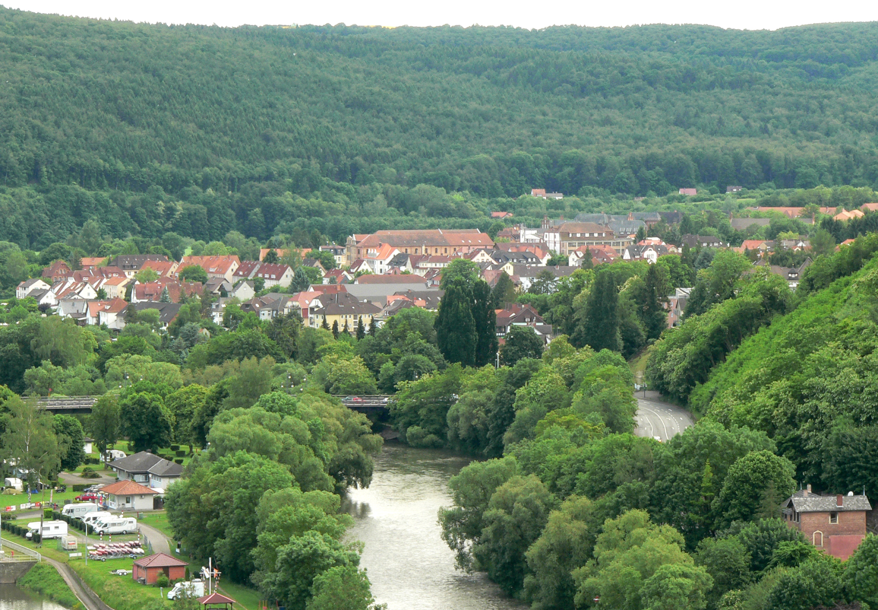 Neumünden von der Weserliedanlage gesehen